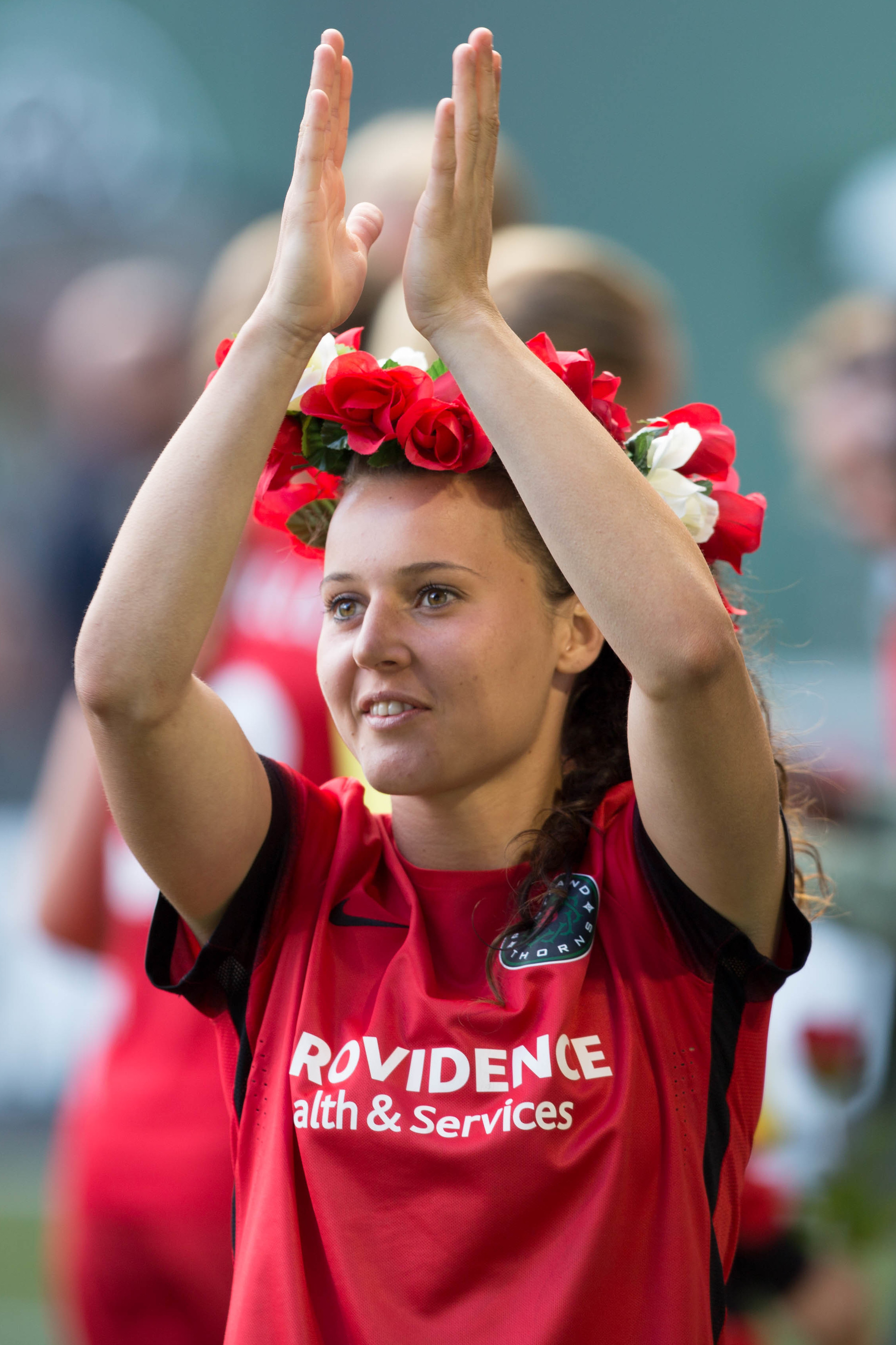 N42A3268.jpg